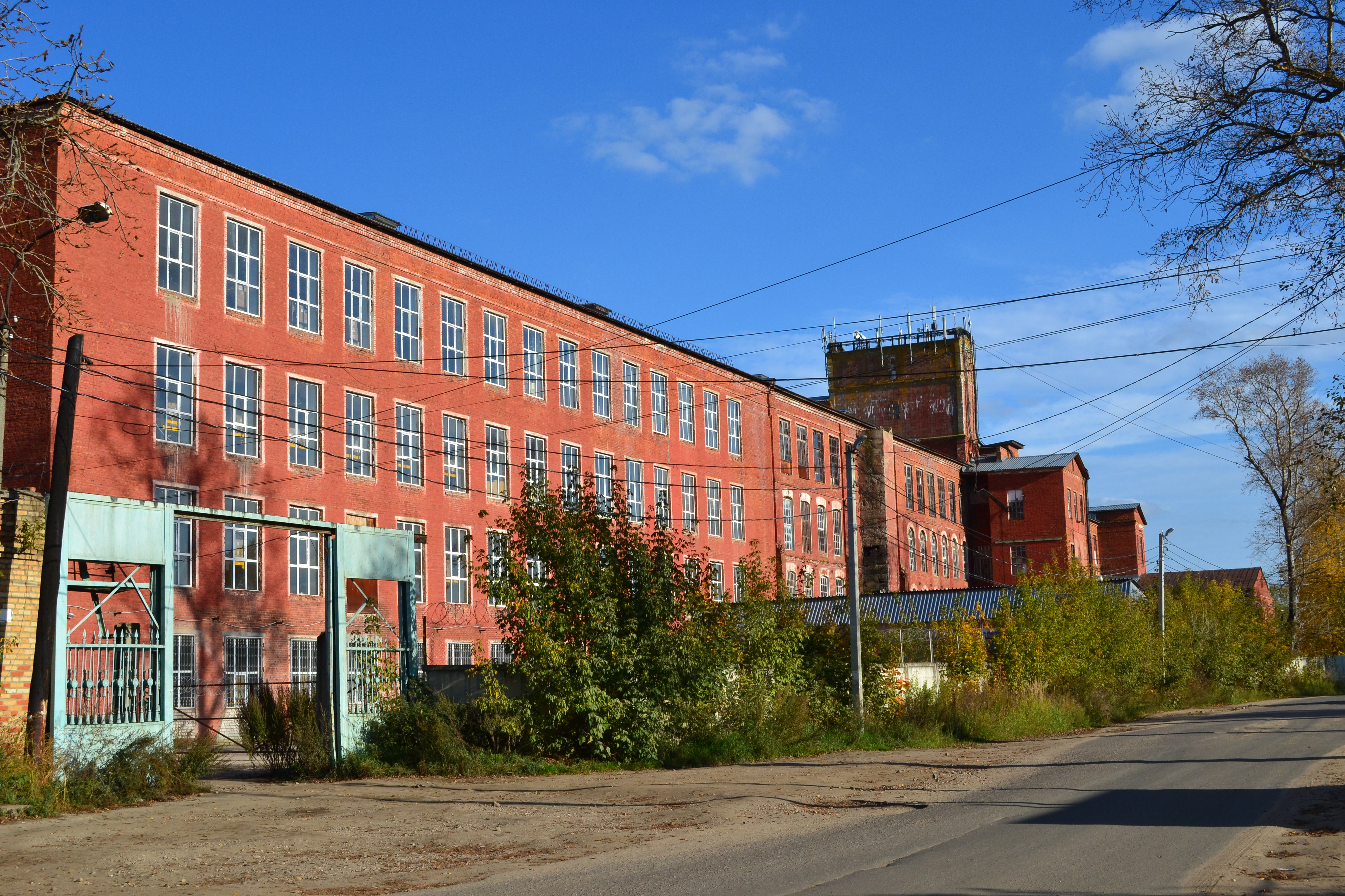 Соколовская мануфактура Барановых: улица Суворова, Струнино, Александровский район, Владимирская область